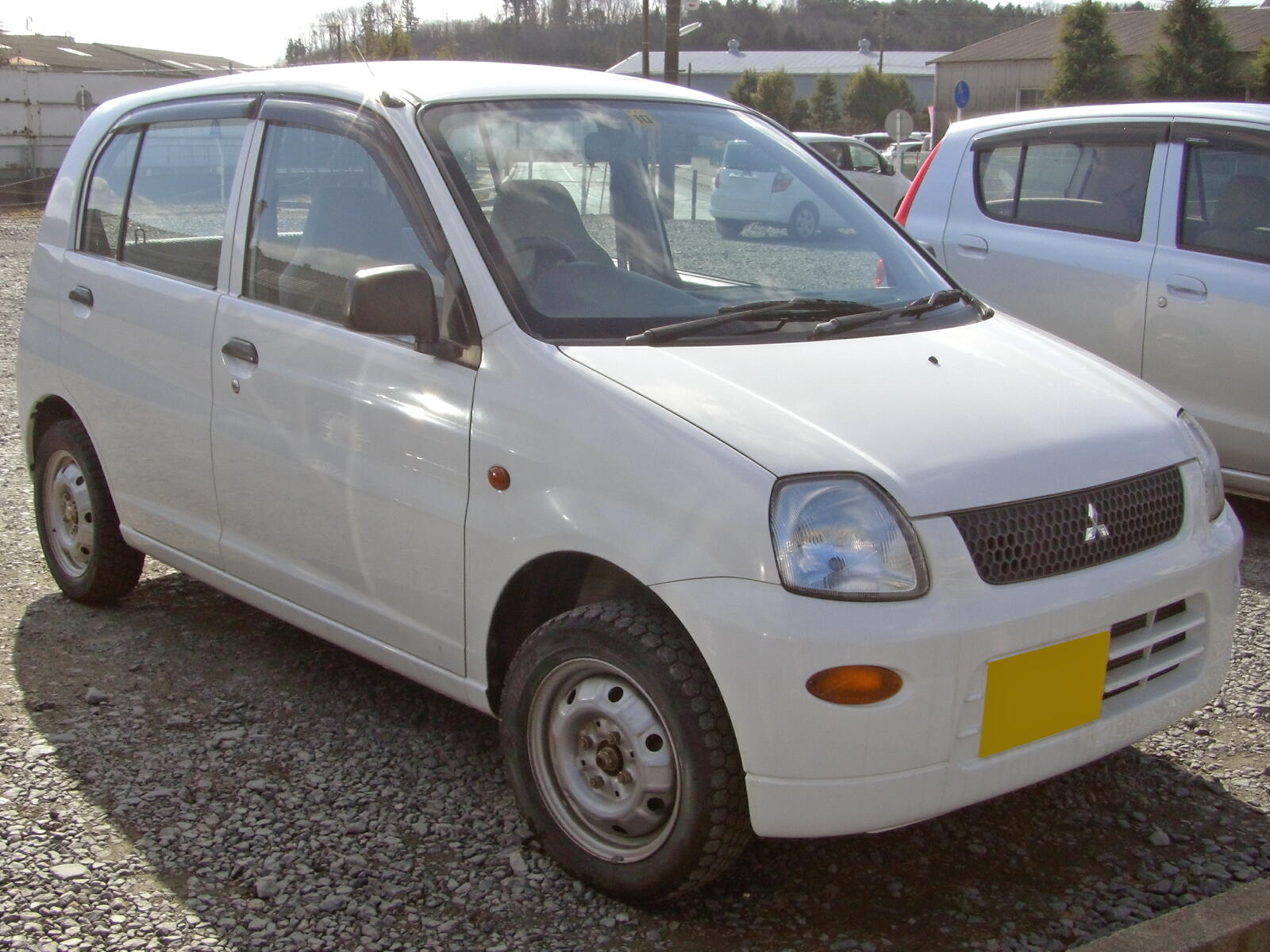 三菱・ミニカ（8代目5ドアセダン・後期型）